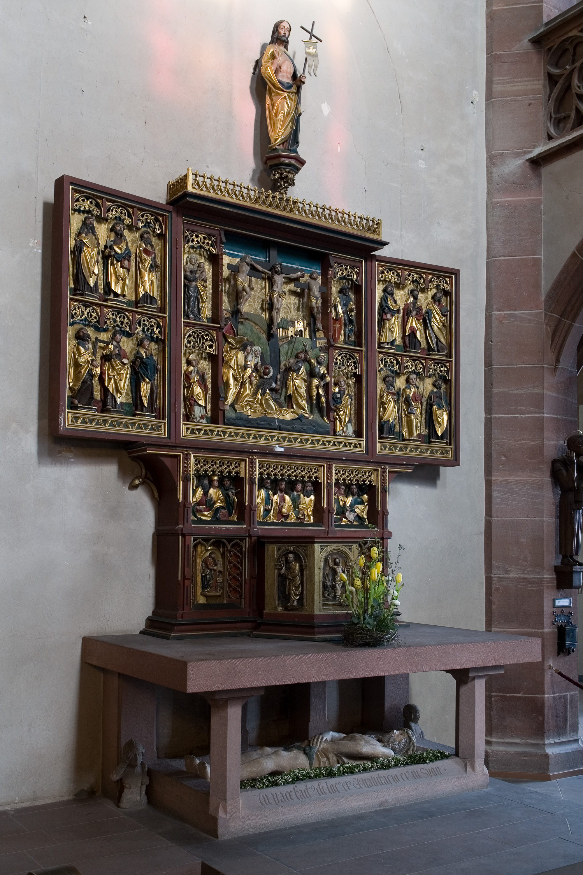 Kreuzaltar (um 1520, Niedersachsen) im südlichen Hauptschiff der Leonhardskirche in Frankfurt am Main, geöffneter Zustand. Selber fotografiert im März 2008, Doppellizensierung GFDL & CC-BY-SA 2.5.